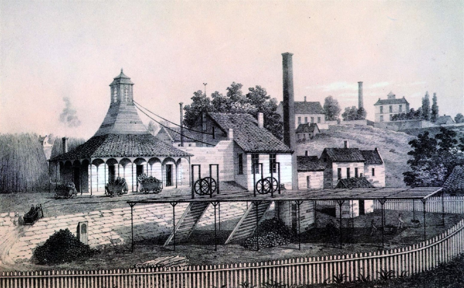 La fosse du Chaufour de la Compagnie des mines d'Anzin était un charbonnage du bassin minier du Nord-Pas-de-Calais constitué d'un seul puits situé à Valenciennes, Nord, Nord-Pas-de-Calais, France.